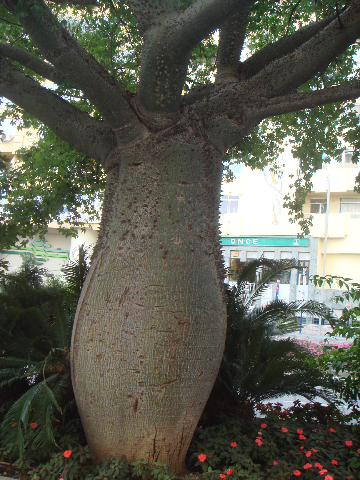 Palo borracho de flor blanca (Ceiba chodatii), Marbella, España.